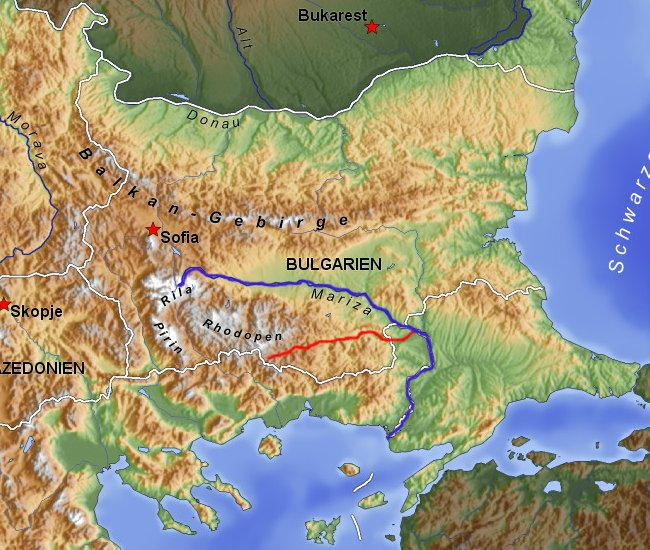 Bulgaria: river Arda (red line), river Mariza (blue line)